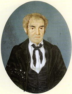 Autorretrato de Francisco Cabrera